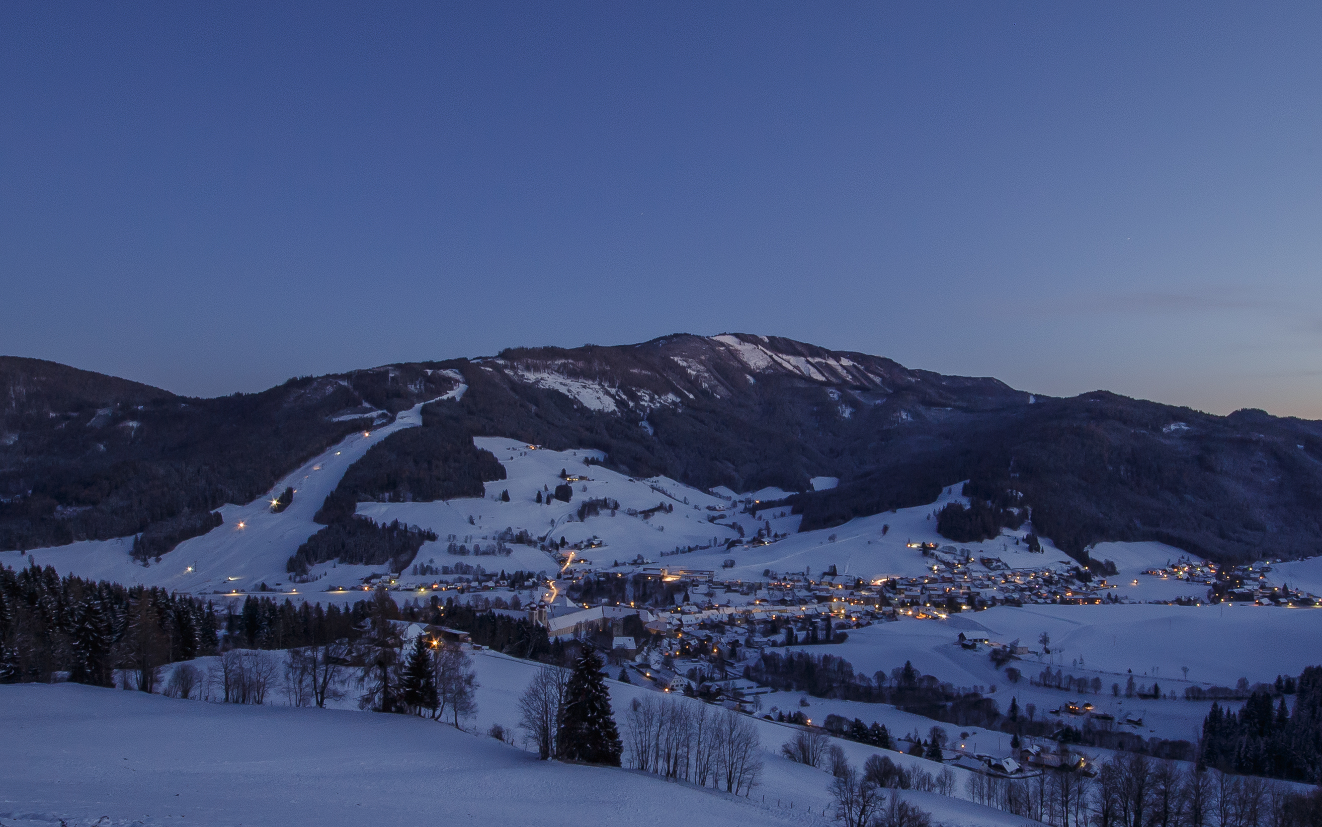 Sankt Lambrect a Grebezen lábánál